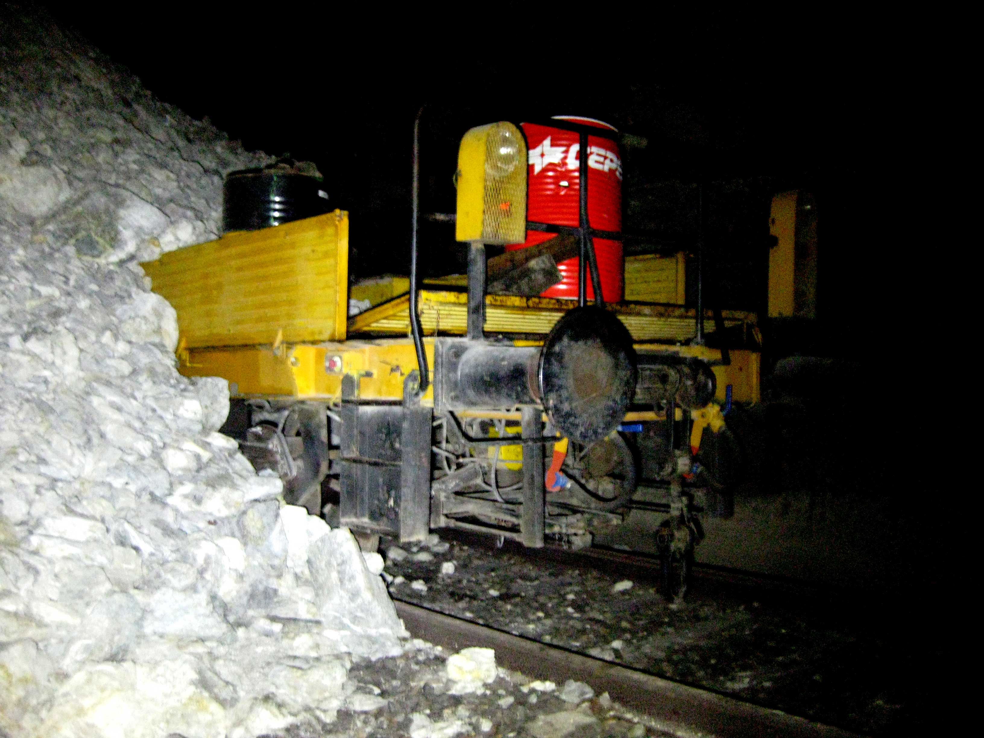 Un derrumbe la dejó atrapada en 2011 a un kilómetro escaso de la boca norte.